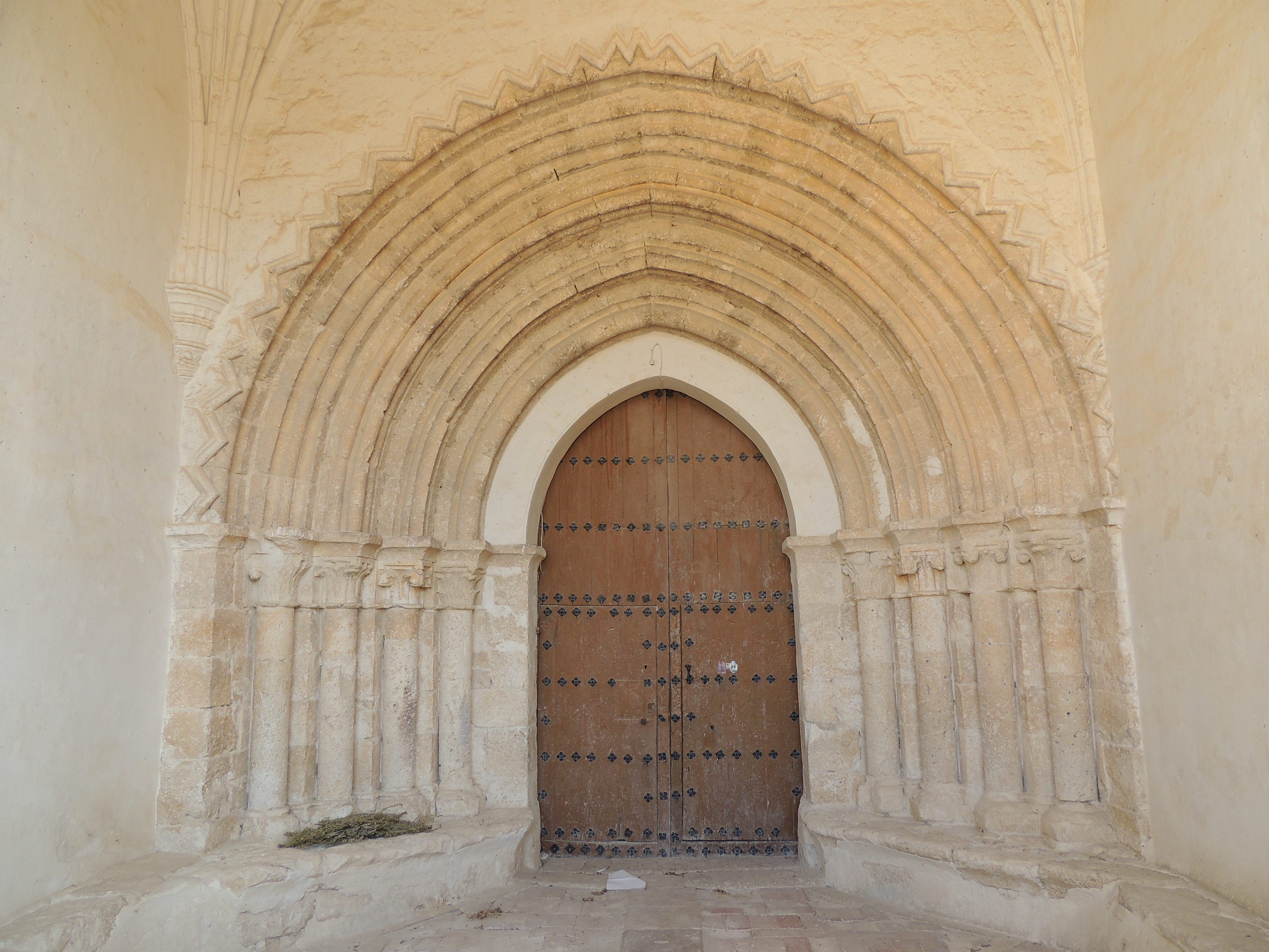 Portada